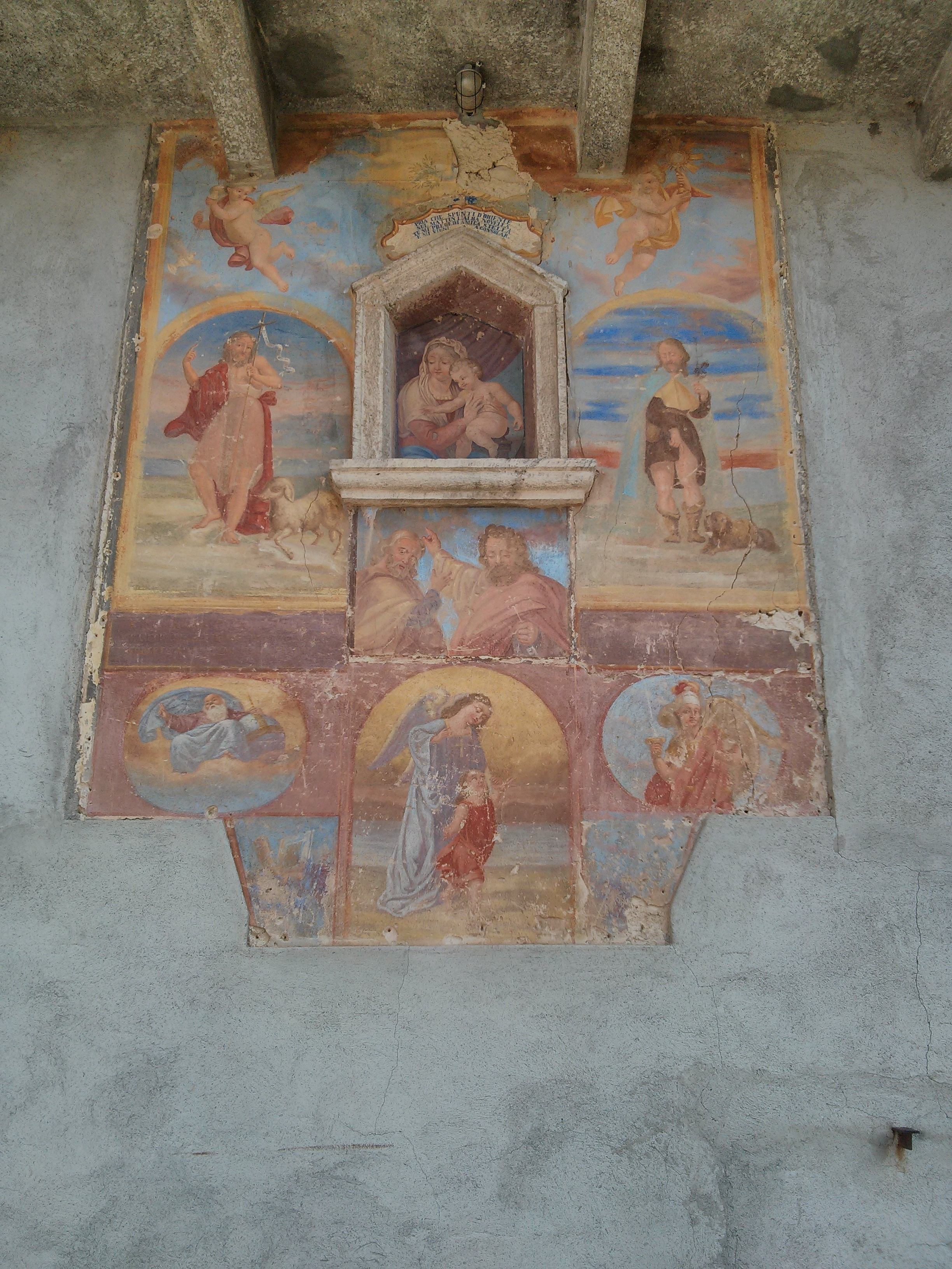 colle di sogno carenno - affresco